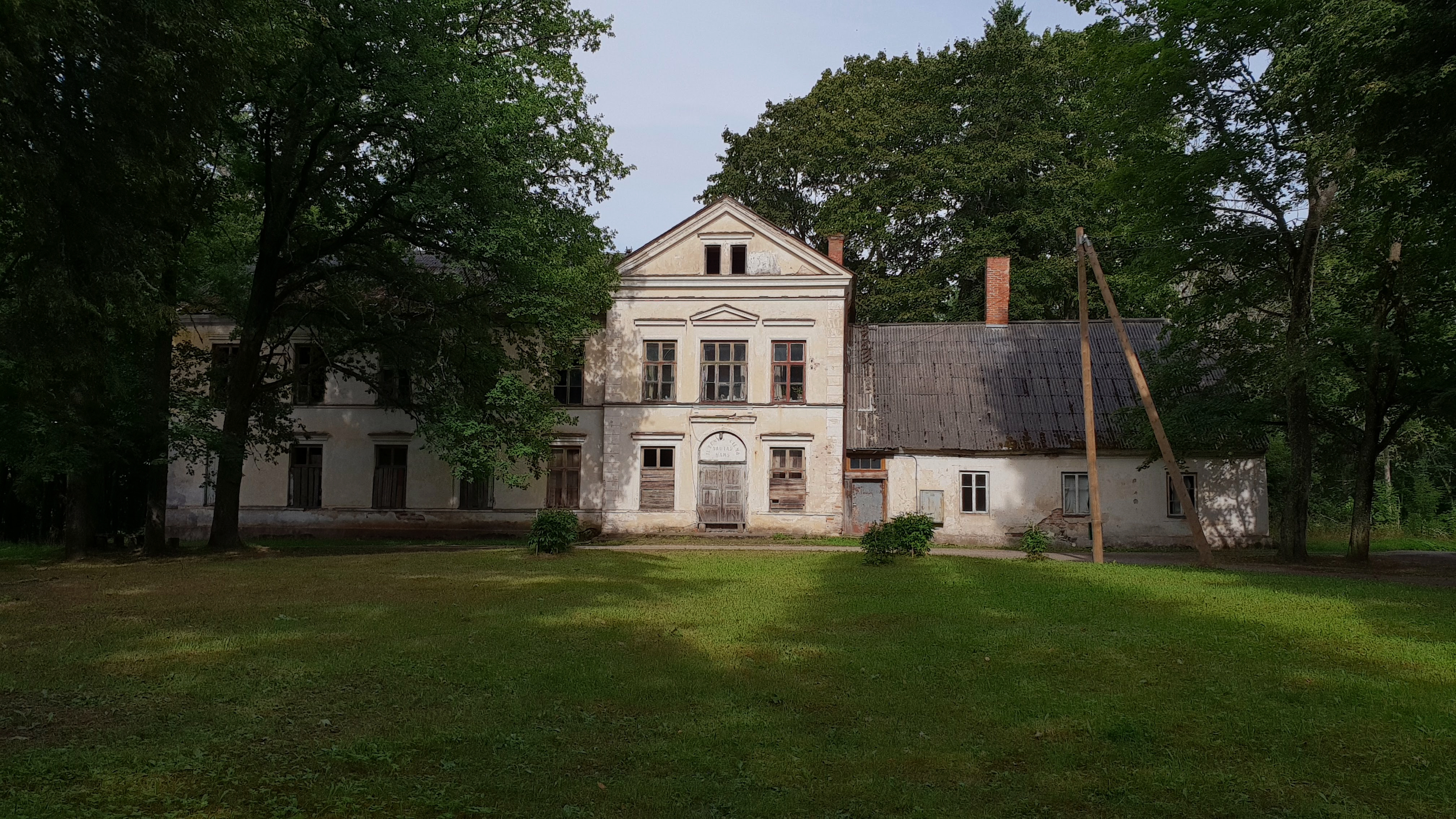 Ilzene mõisa peahoone 2018. aastal